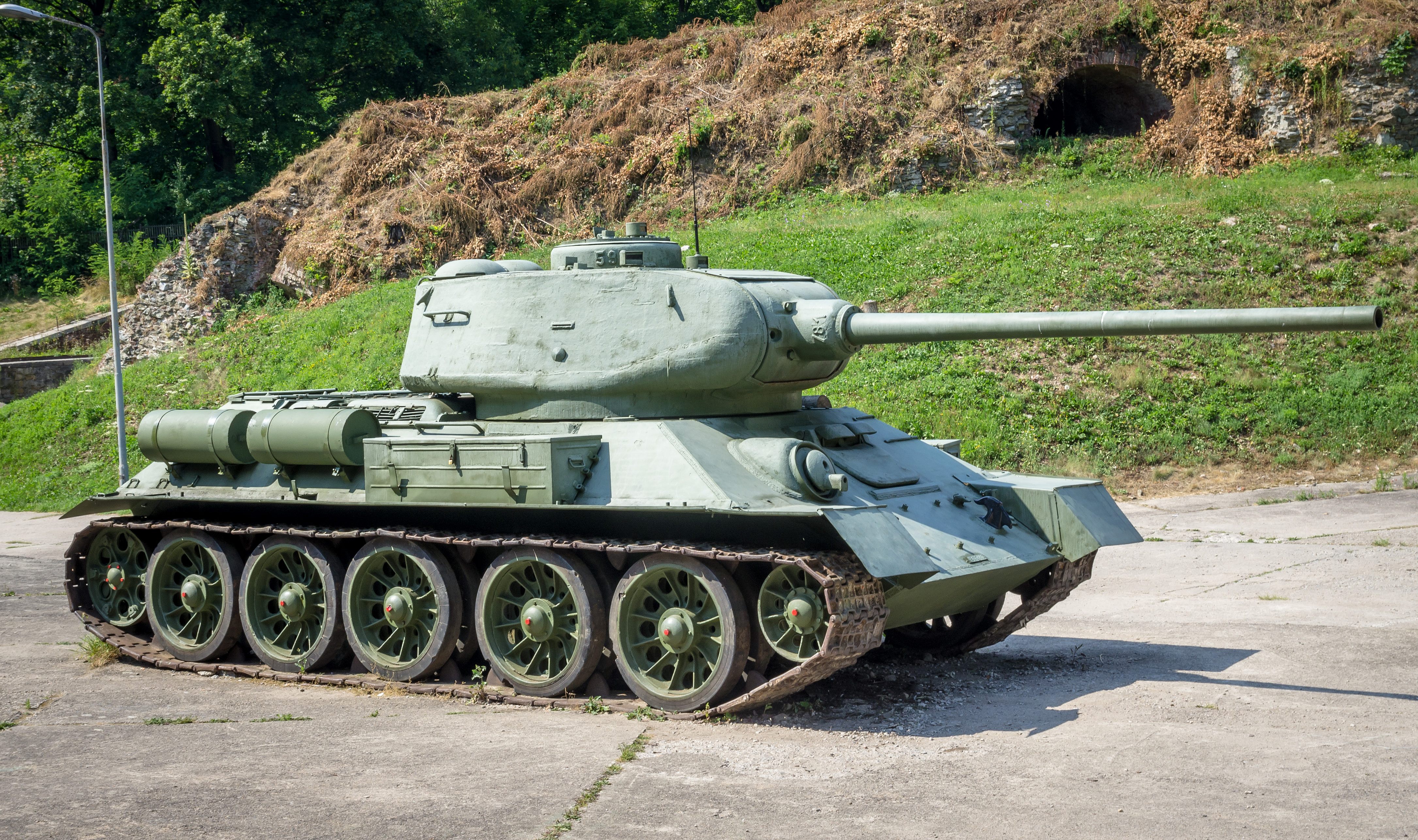 Kłodzko - twierdza This photo of Lower Silesian Voivodeship was taken during Wikiexpedition 2013 set up by Wikimedia Polska Association. You can see all photographs in category Wikiekspedycja 2013.